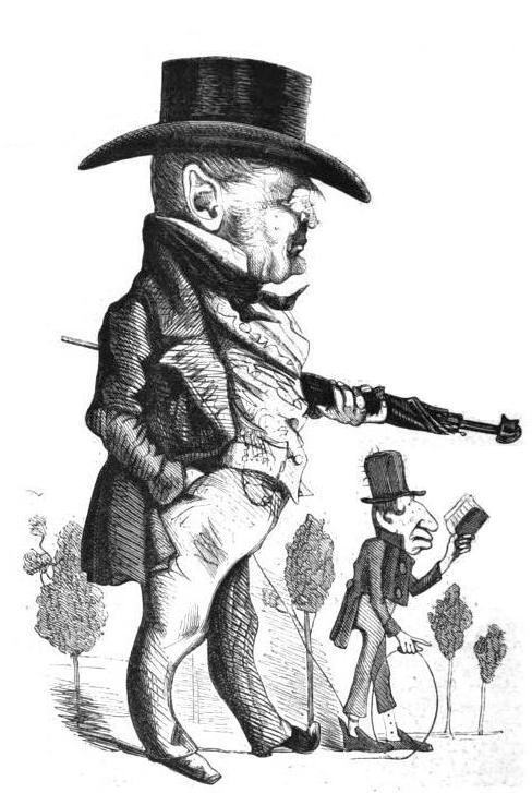 "Vieillard"